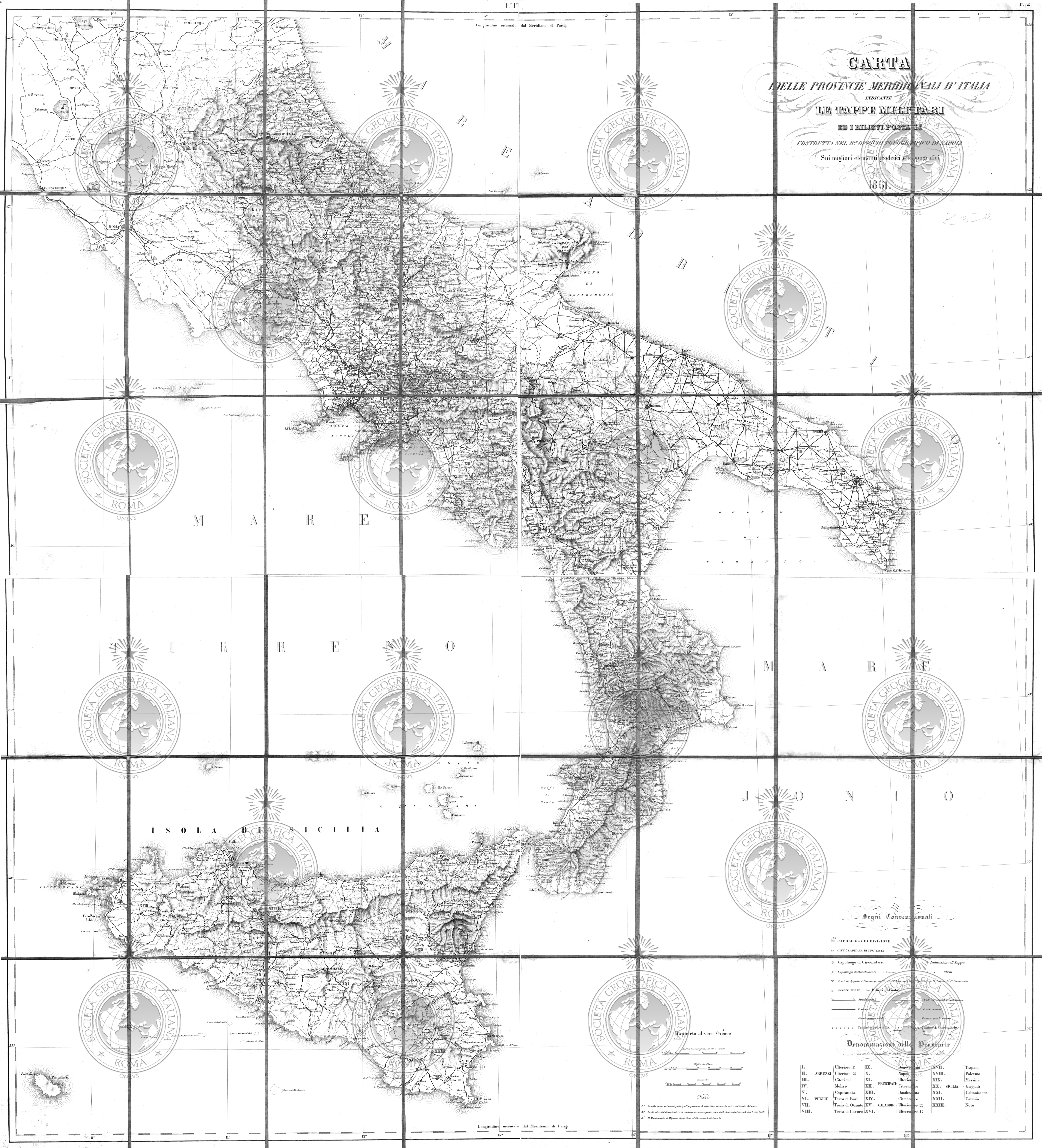 Costrutta nel Reale Officio Topografico di Napoli sui migliori elementi geodetici e topografici, 1861